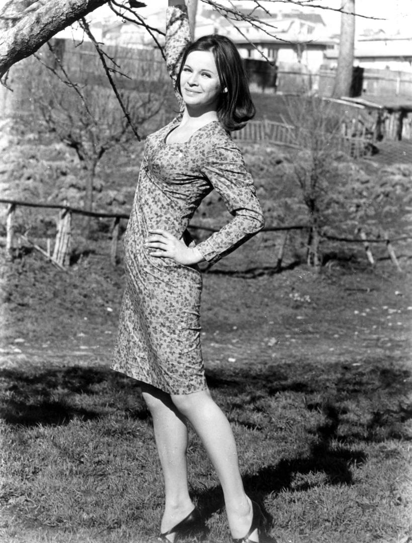 L'attrice italiana Laura Antonelli a Milano nel 1974.